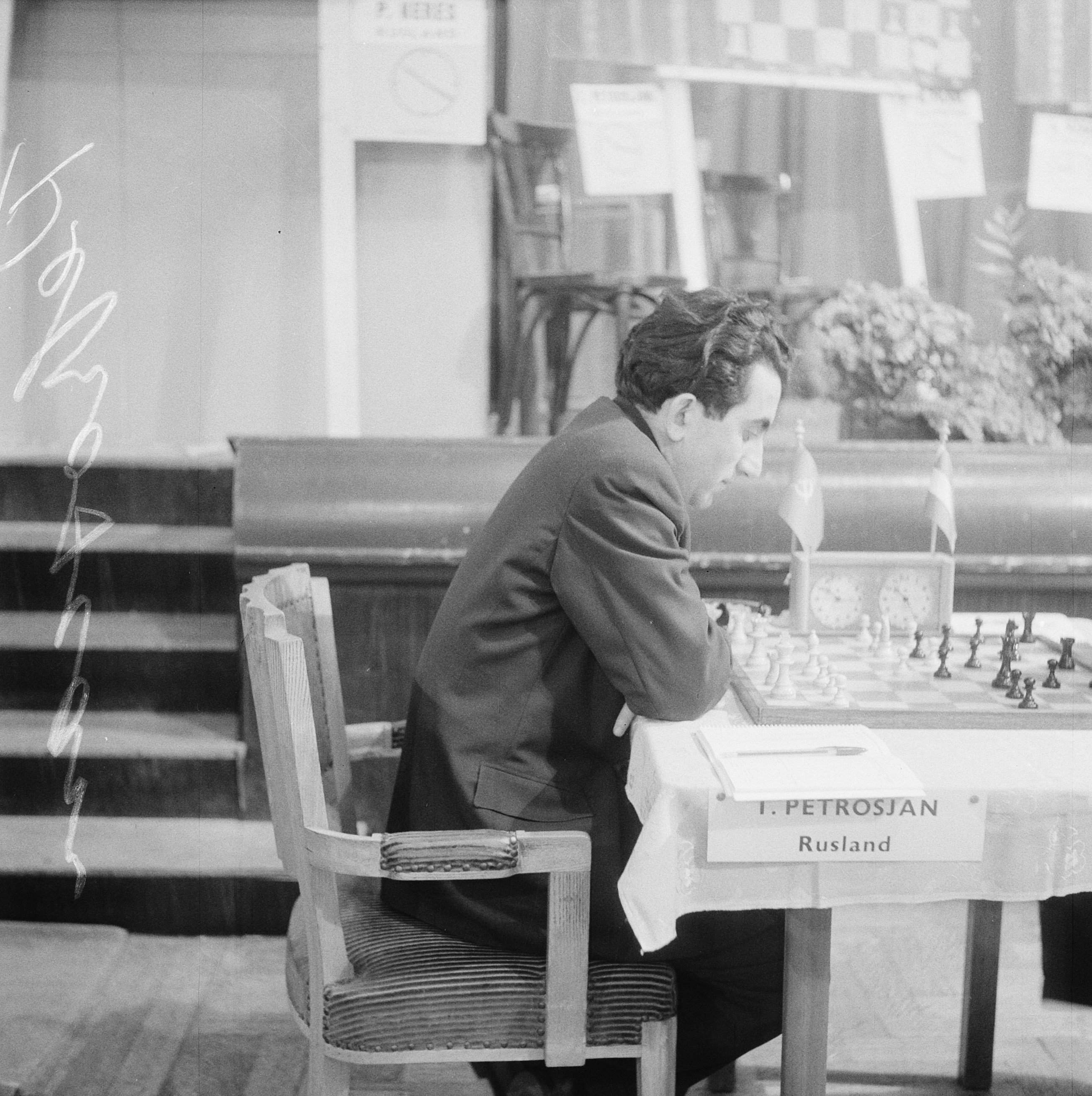 Collectie / Archief : Fotocollectie Anefo Reportage / Serie : [ onbekend ] Beschrijving : Schakers. Petrosan Datum : 9 april 1956 Trefwoorden : schakers Fotograaf : Noske, J.D. / Anefo Auteursrechthebbende : Nationaal Archief Materiaalsoort : Negatief (zwart/wit) Nummer archiefinventaris : bekijk toegang 2.24.01.03 Bestanddeelnummer : 934-5872